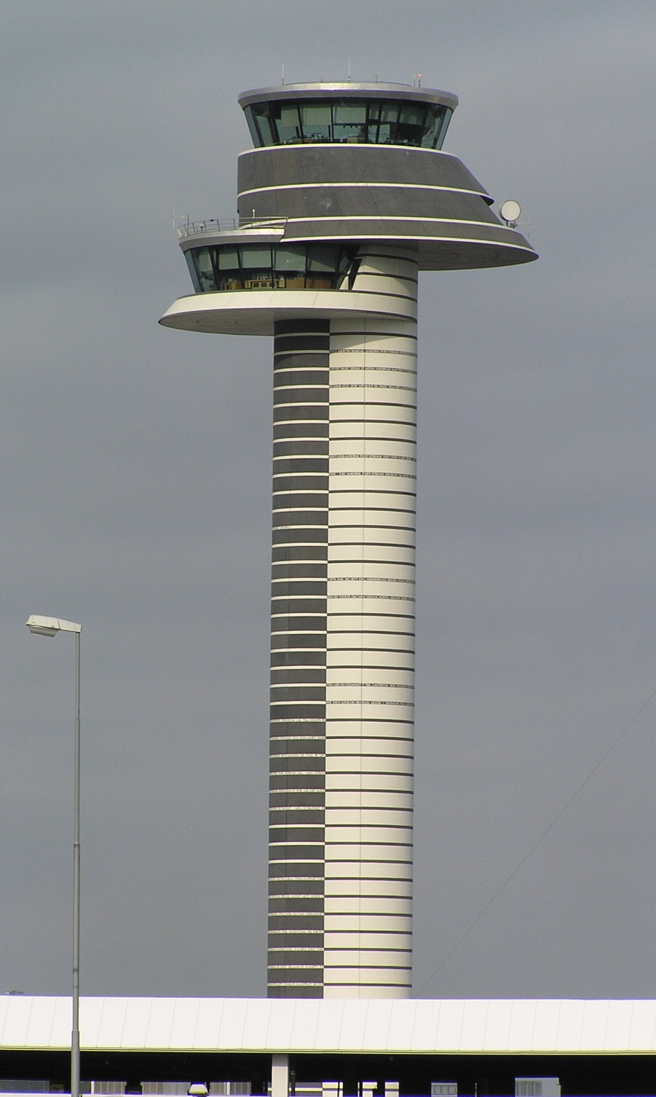 Torre de control de aeropuerto Control tower of the Arlanda Airport (Stockholm, Sweden) Author: Mr. Tickle Date: September 22nd, 2005